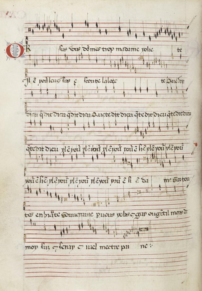 Paris, Bibliothèque Nationale, fonds italien 568